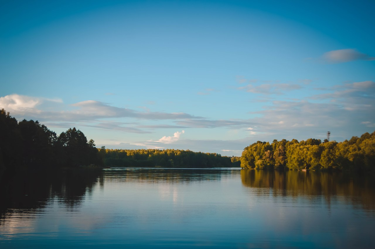 Глуховский Парк Культуры и Отдыха, Ногинский район This image is related to the protected area of Russia number 5010166